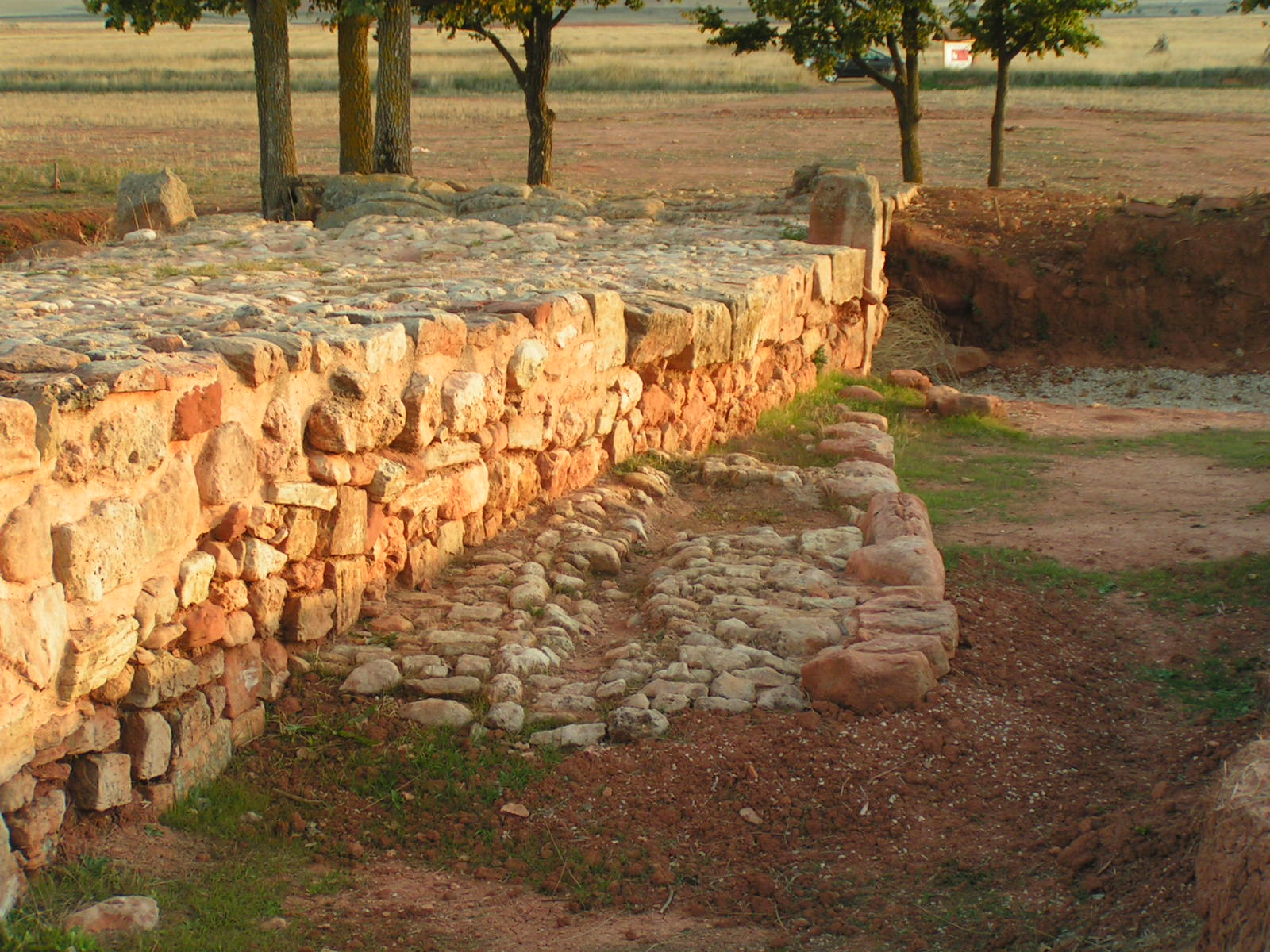 Calzada lateral realizada durante la segunda fase constructiva del puente